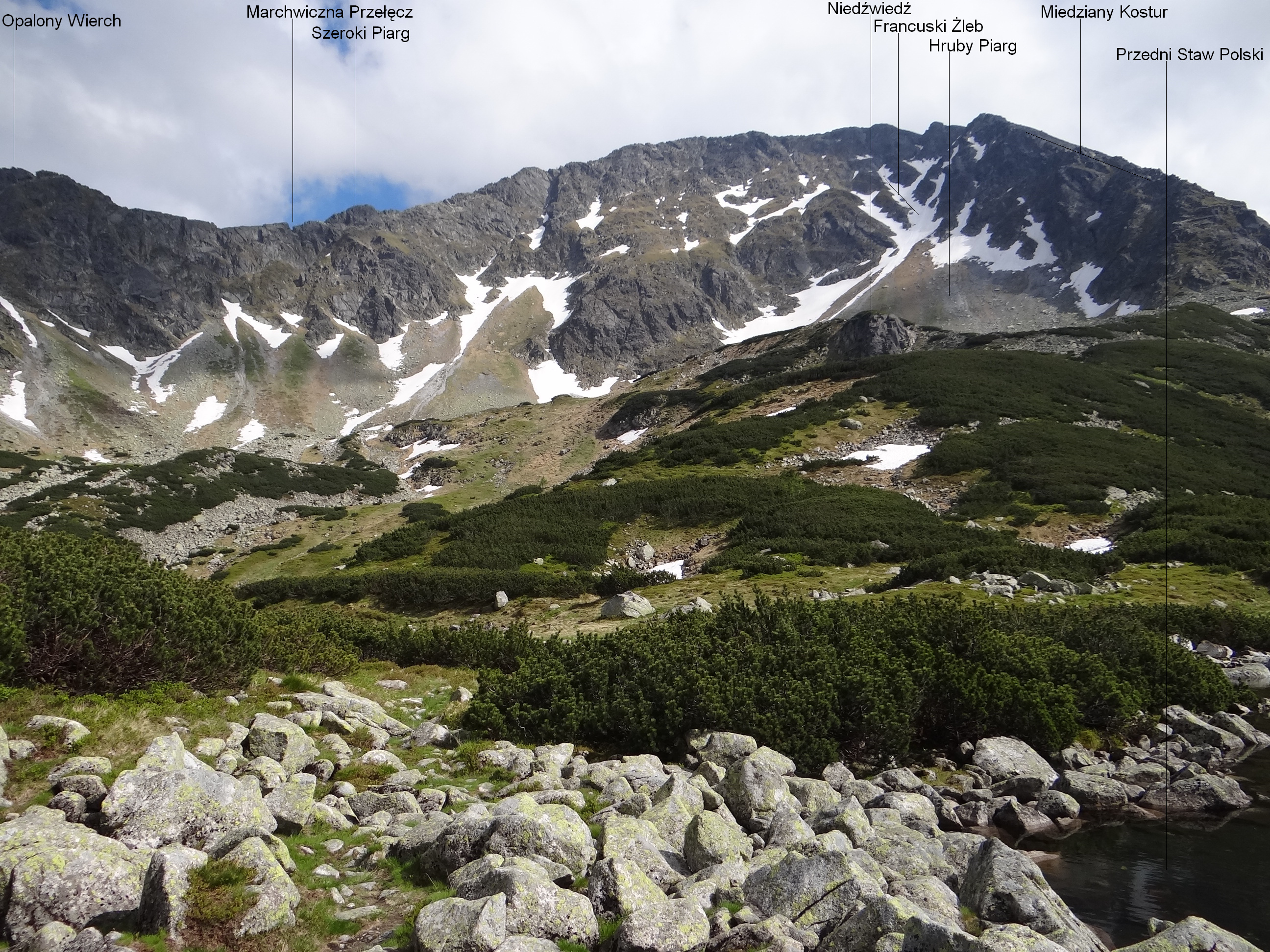 Stoki Miedzianego od strony Doliny Pięciu Stawów Polskich